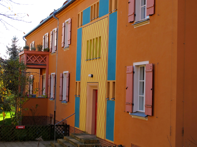 Gartenstadt Falkenberg "Tuschkastensiedlung" Oktober 2012